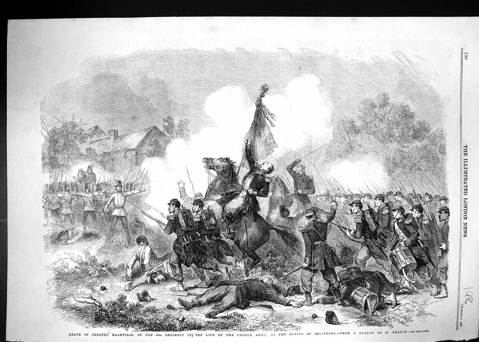 Ricostruzione dell'episodio che vide protagonista il colonnello Charles de Maleville , comandante del 55º reggimento di fanteria di linea francese, in località Casa Nuova durante la battaglia di Medole, nel corso della grande battaglia di Solferino e San Martino, il 24 giugno 1859.